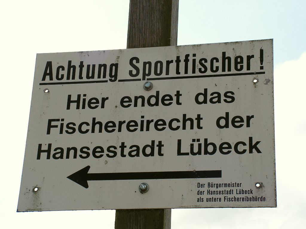 Wakenitz/Hinweisschild am Ratzeburger See bei Rothenhusen